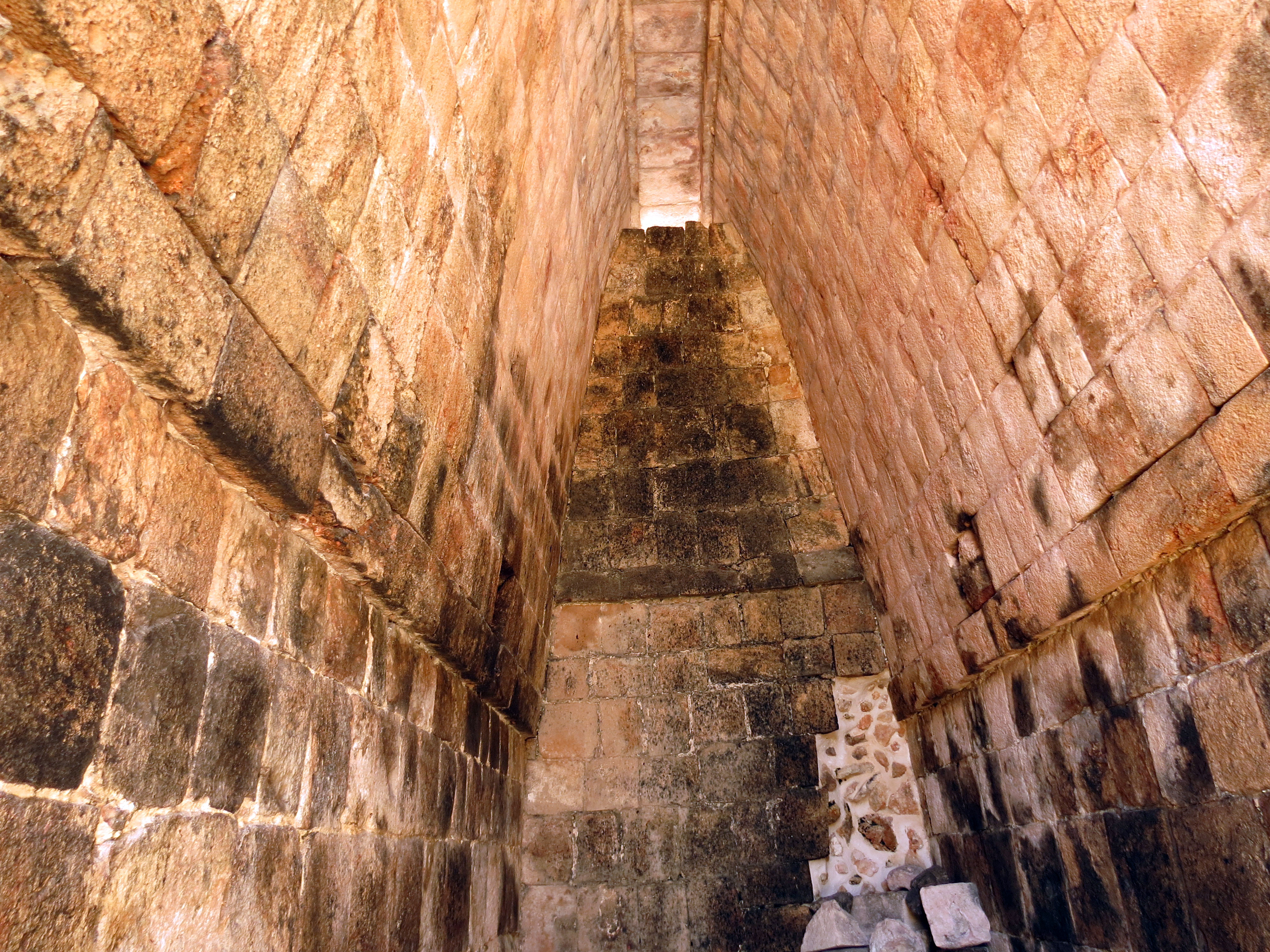 Sitio arqueológico Uxmal, Yucatán, México.